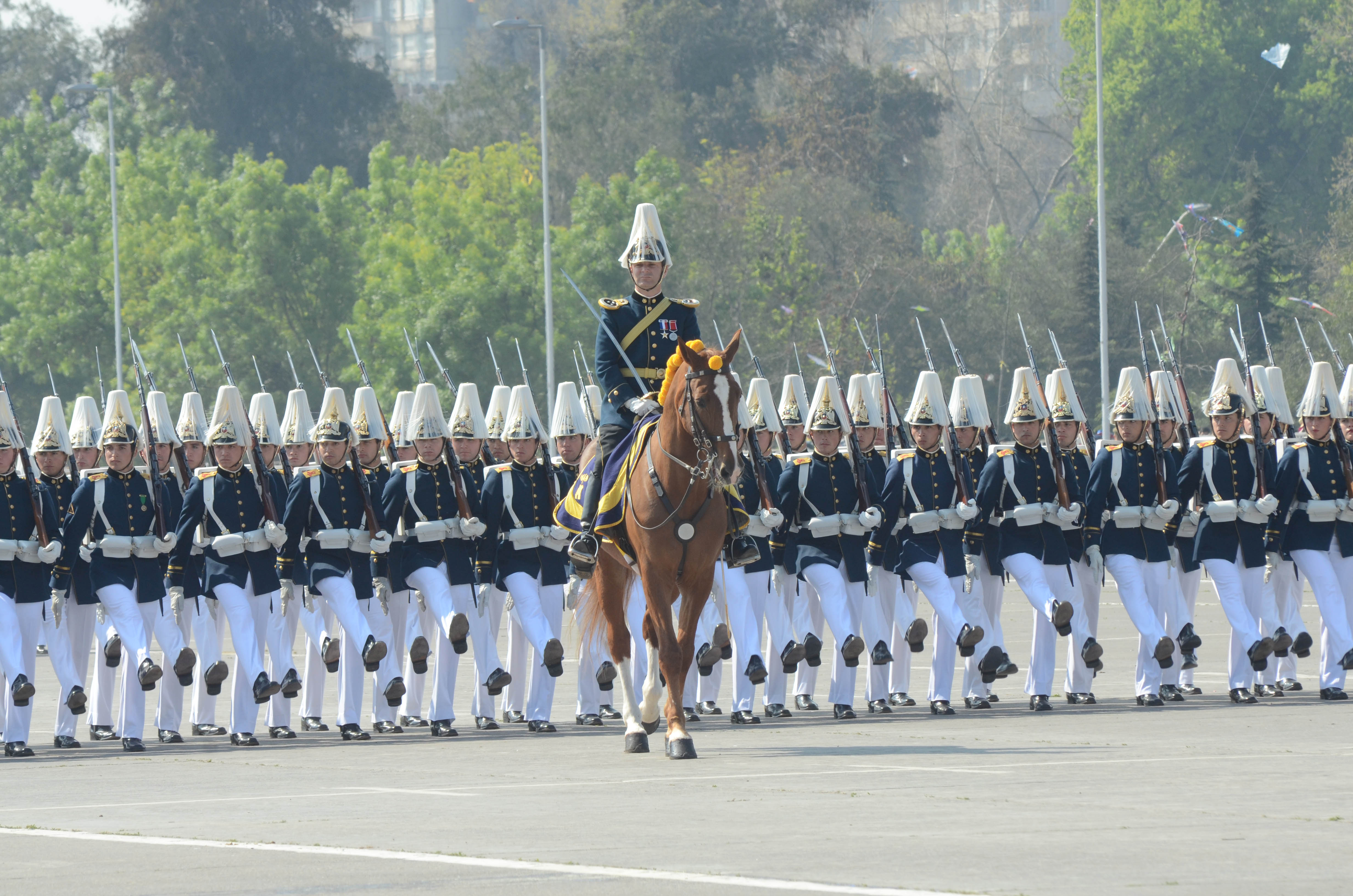 Chilean Parada Militar 2014